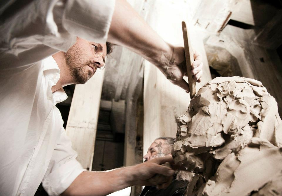 Bertrand Freiesleben beim Modellieren von Sven Marquardt im Berghain